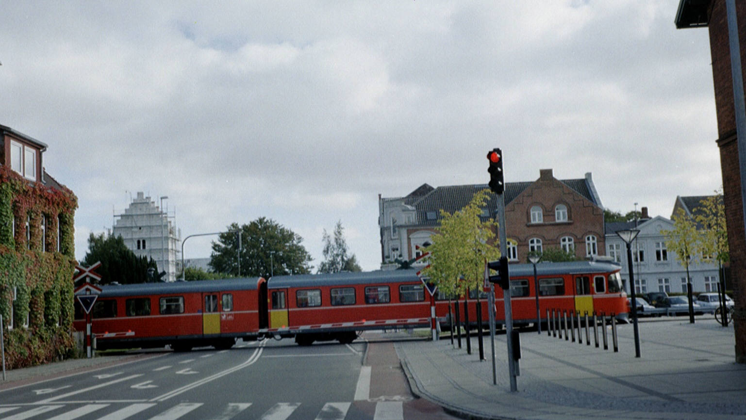 Odderbanen ankommer til Odder